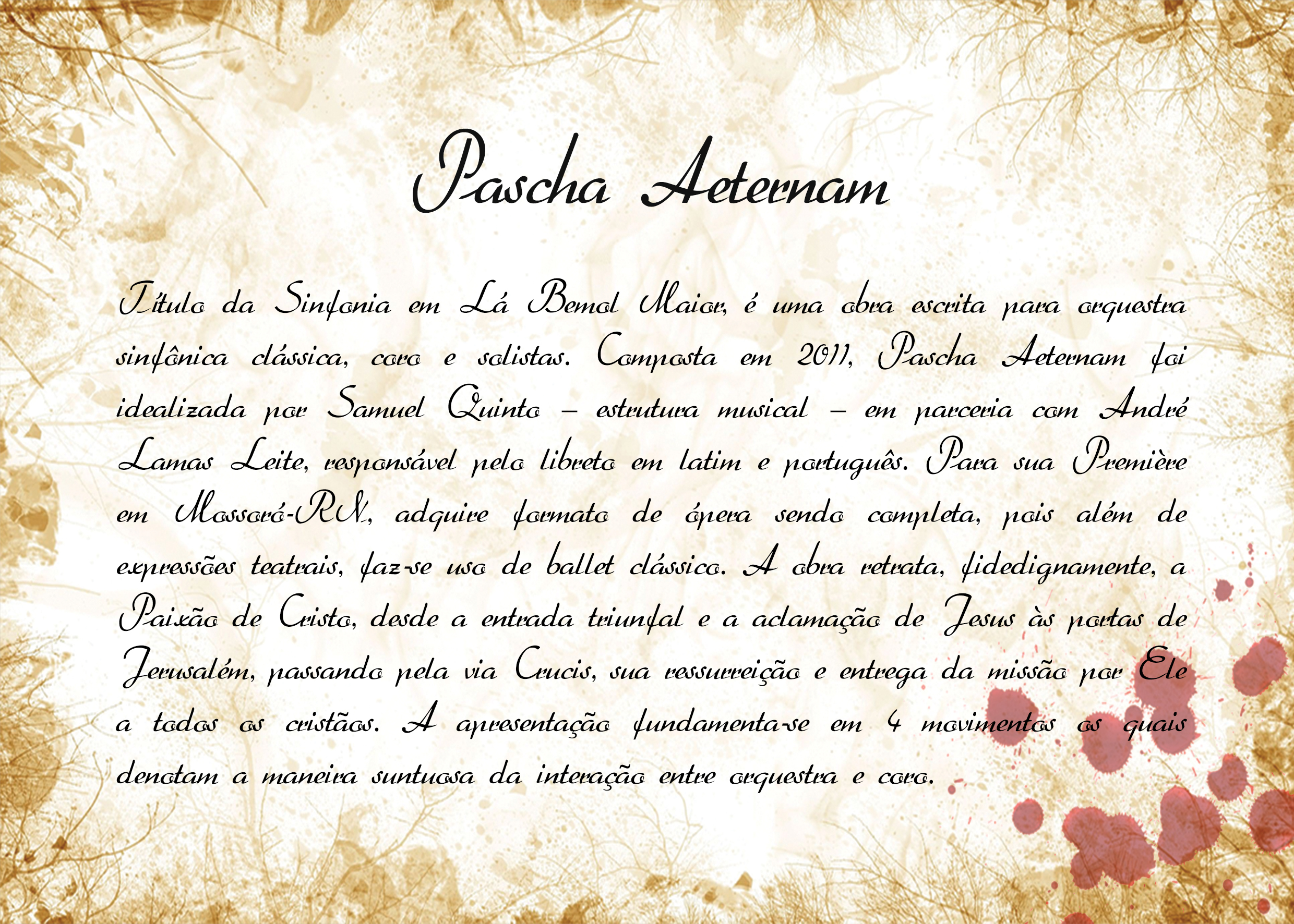 Encarte interno do libretto